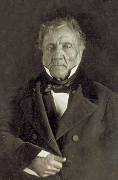 Aimé Bonpland